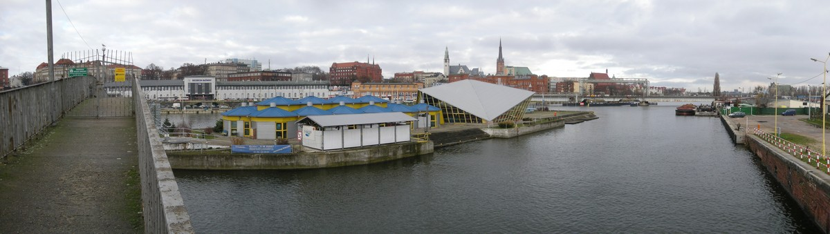 Wyspa Przymoście, Szczecin